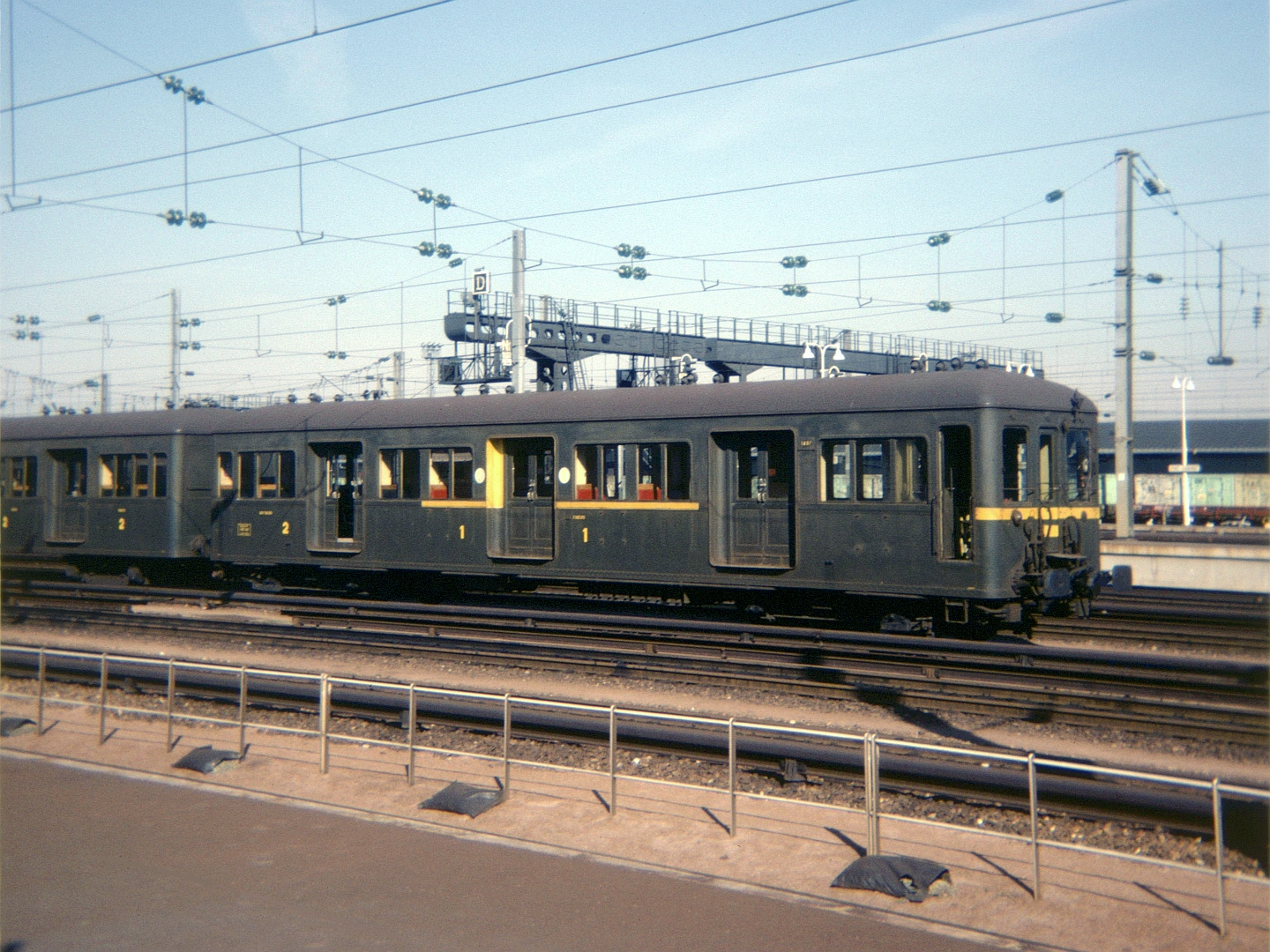 Rame "Standard" aux garages des Batignolles le 18 septembre 1976.